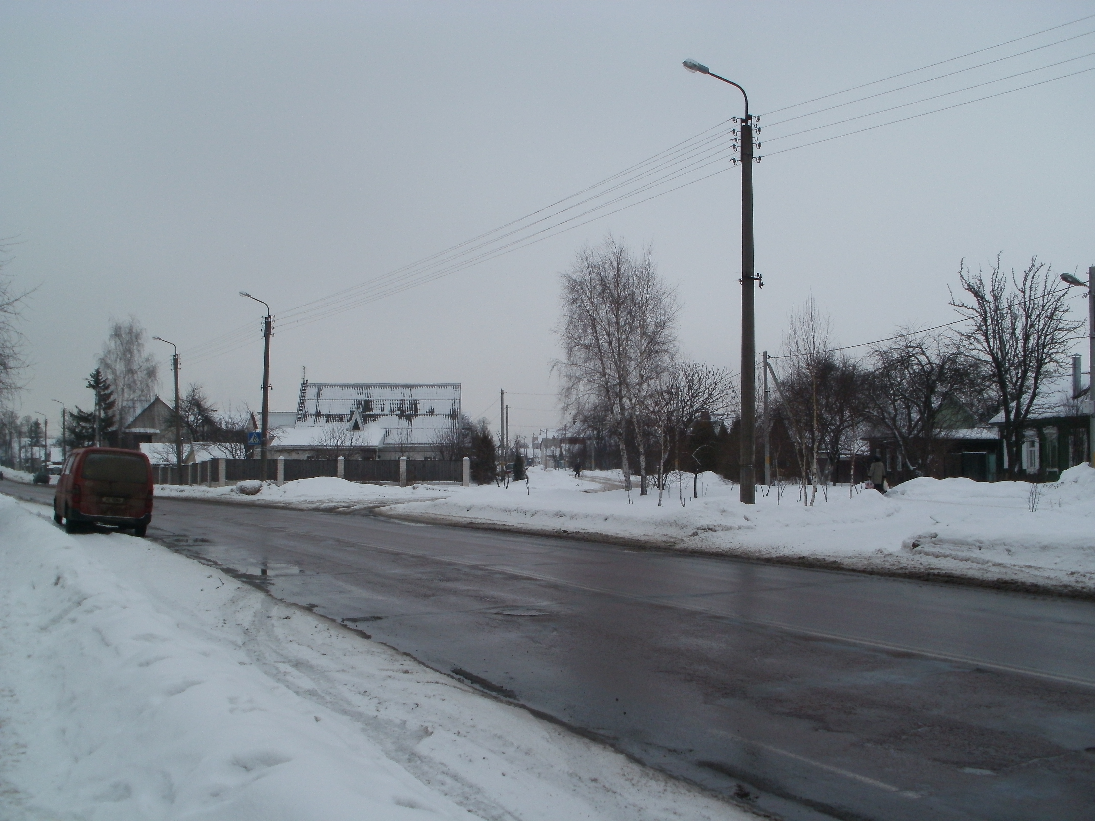 Беларуская (тарашкевіца): Скрыжаваньне вуліц Навалюбенскай і Быхаўскай